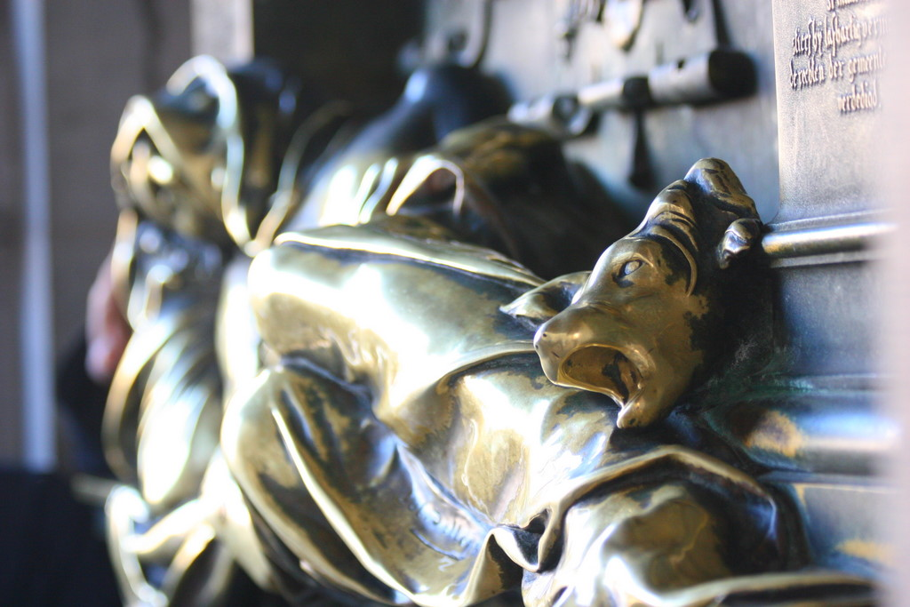 A brüsszeli Grote Markt téren található Serclaes-emlékmű részlete